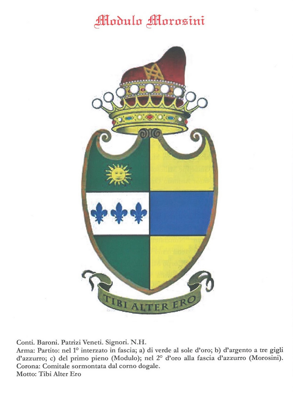 Titoli Nobiliari: CONTI, VISCONTI, BARONI, PATRIZI VENETI, SIGNORI, CAV., N.H. ARMI Partito: nel 1° interzato in fascia; a) di verde al sole d'oro; b) d'argento a tre gigli d'azzurro; c) del primo pieno (Modulo); nel 2° d'oro alla fascia d'azzurro (Morosini). Corona: Comitale sormontata dal corno dogale Alias arma antica: D'azzurro al leone d'oro lampassato e armato di rosso sostenuto da sei monti all'italiana (1.2.3.) d'argento moventi dalla punta. MOTTI Tibi Alter Ero - Et Avulsa Florescunt - Nobis Est Ira Leonis CIMIERO Corno Dogale Veneto